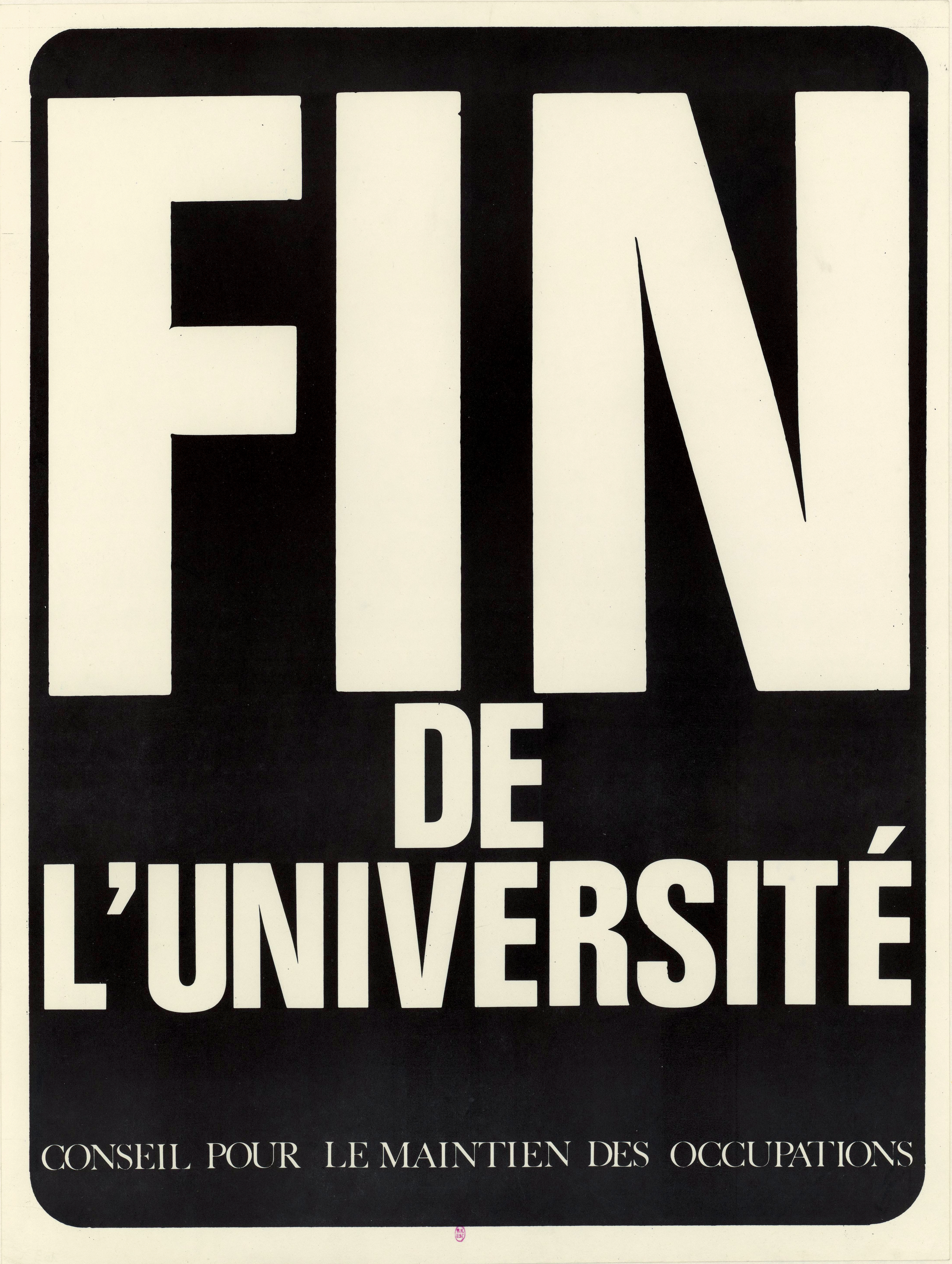 Fin de l'Université. Conseil pour le maintien des occupations. Affiche Mai 1968.